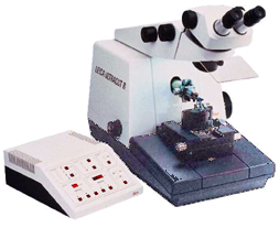 Leica Ultracut (UCT) Ultramicrotome